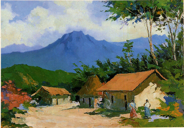 imagen del cuadro Paisaje del Barú del pintor Marco Ernesto